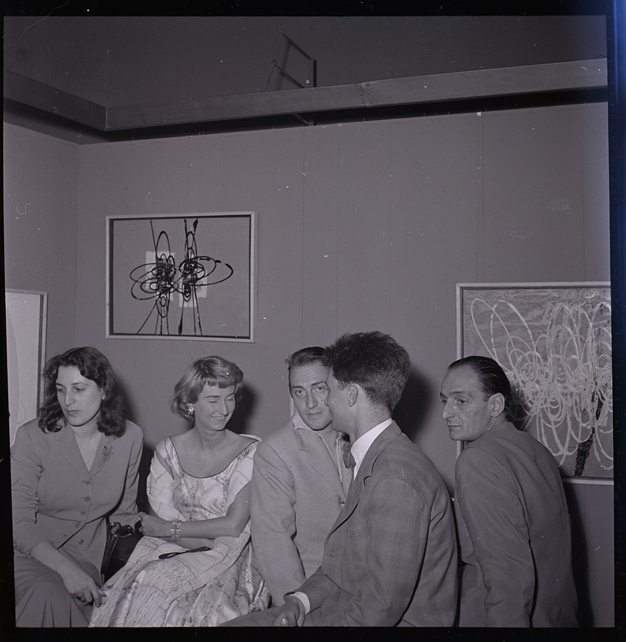 Venezia. Galleria del Cavallino? Interni. Mostra di Roberto Crippa. Ritratti del pittore insieme ad altri artisti? Alle pareti "Spirali", anni '50. dipinti. Servizio fotografico : Venezia, 1954 / Paolo Monti. - Buste: 1, Fototipi: 3 : Negativo b/n, gelatina bromuro d'argento/ pellicola ; 6x6. - ((Serie costituita da 1 busta di carta contenente 2 buste sciolte di negativi identificati con i nn.: 16126, 16127, 16128. . - I negativi (3 strisce) non sono identificabili singolarmente. - Sulla busta identificata con la numerazione 16126/128 iscrizione didascalica manoscritta a matita: "Mostra/ Crippa/ Venezia". - La suddetta serie è contenuta nella scatola R16017-16406 e identificata con l'iscrizione didascalica manoscritta a pennarello nero: "Artisti". - Occasione: Documentazione della mostra di Roberto Crippa alla Galleria del Cavallino